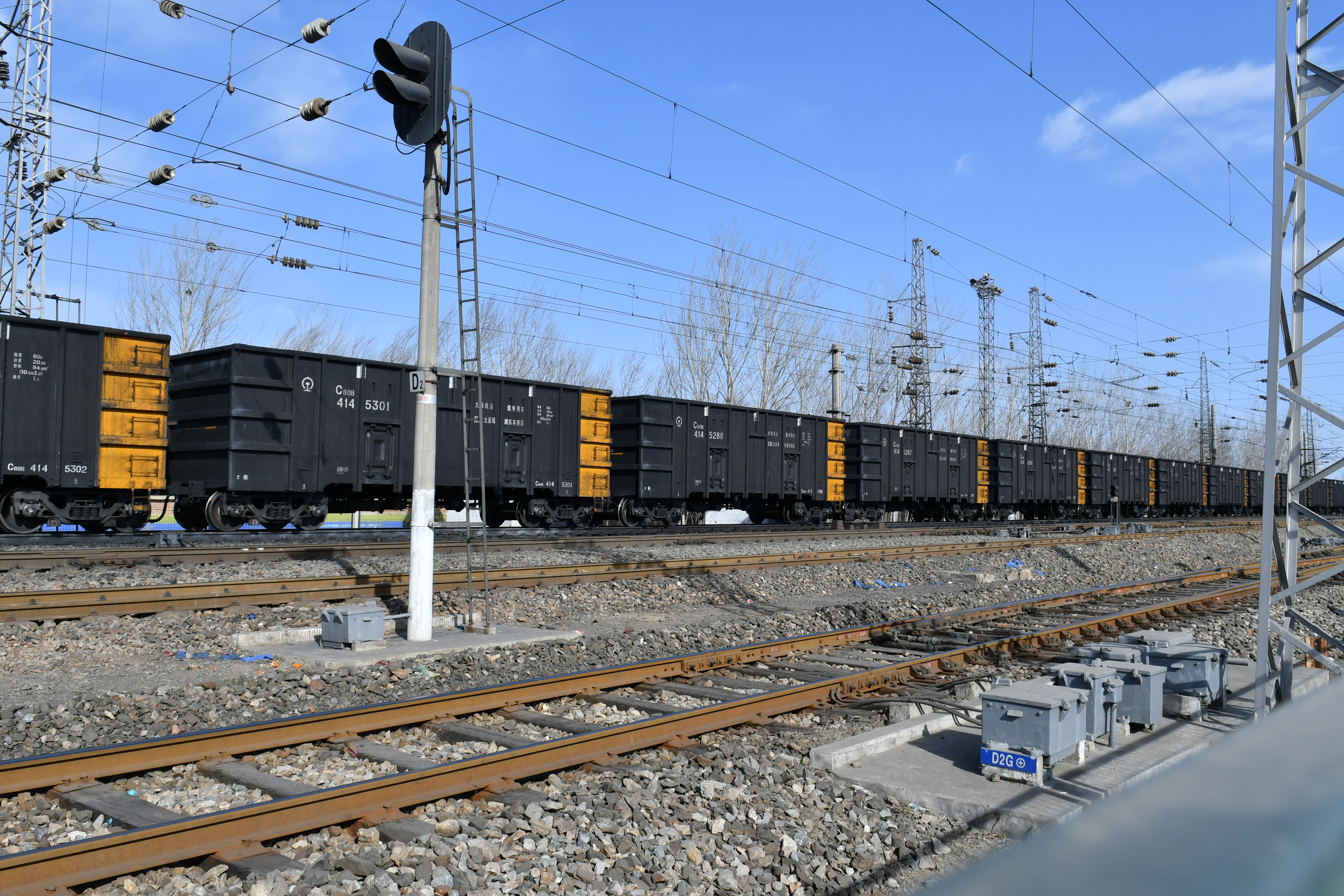 大秦铁路开行的重载组合列车，重载列车专用的C80B型运煤敞车。